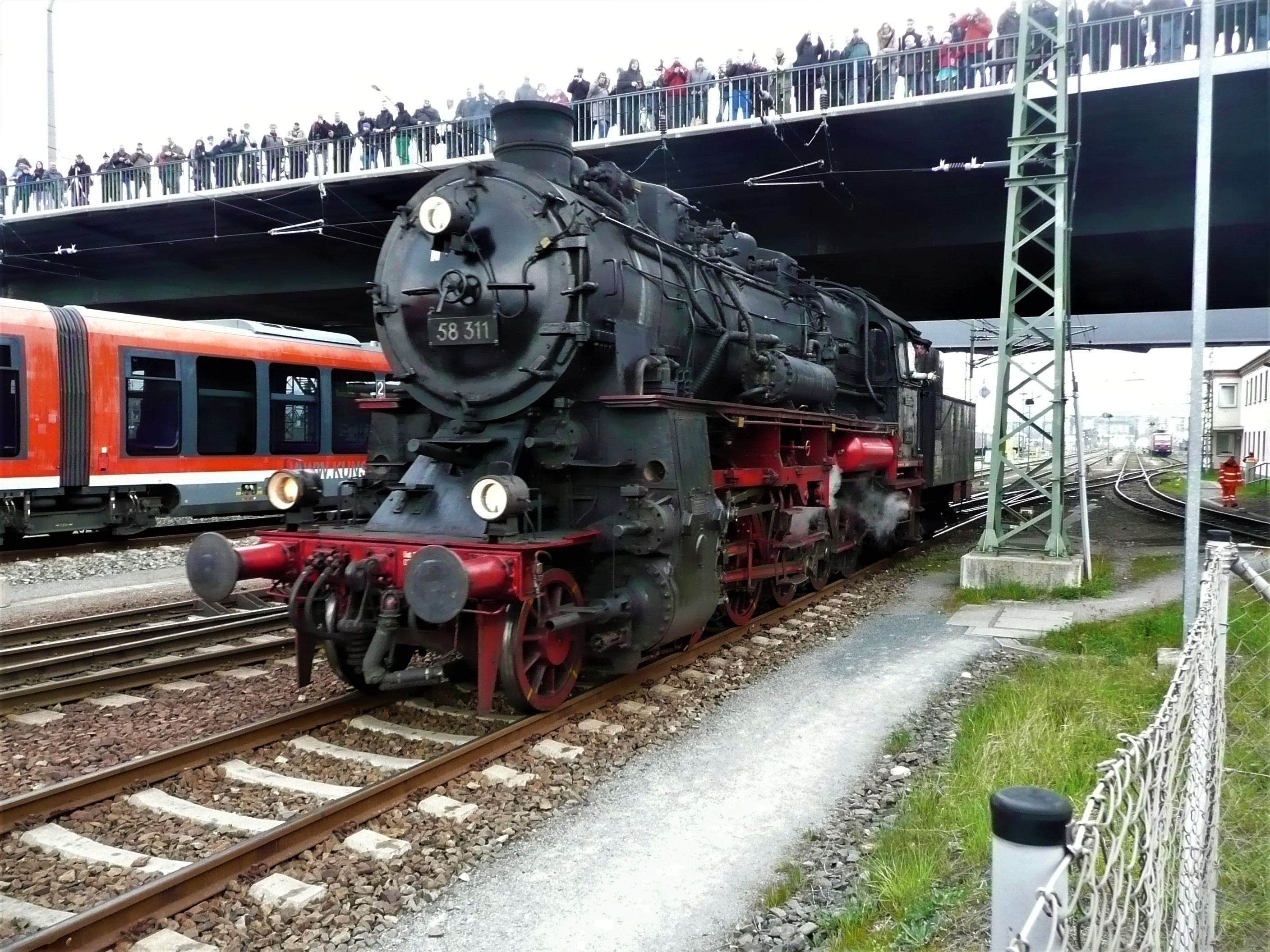 58 311 bei der Nossener Brücke in Dresden